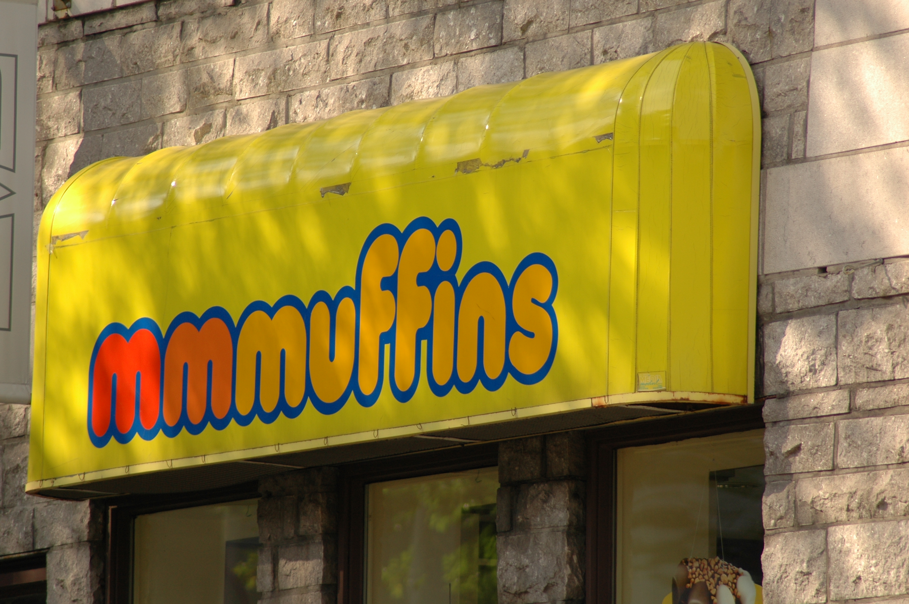 mmmuffins